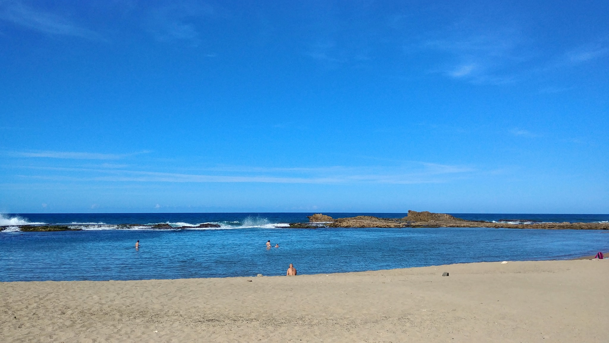 Playa Sardinera, Hatillo, Puerto Rico (2018)